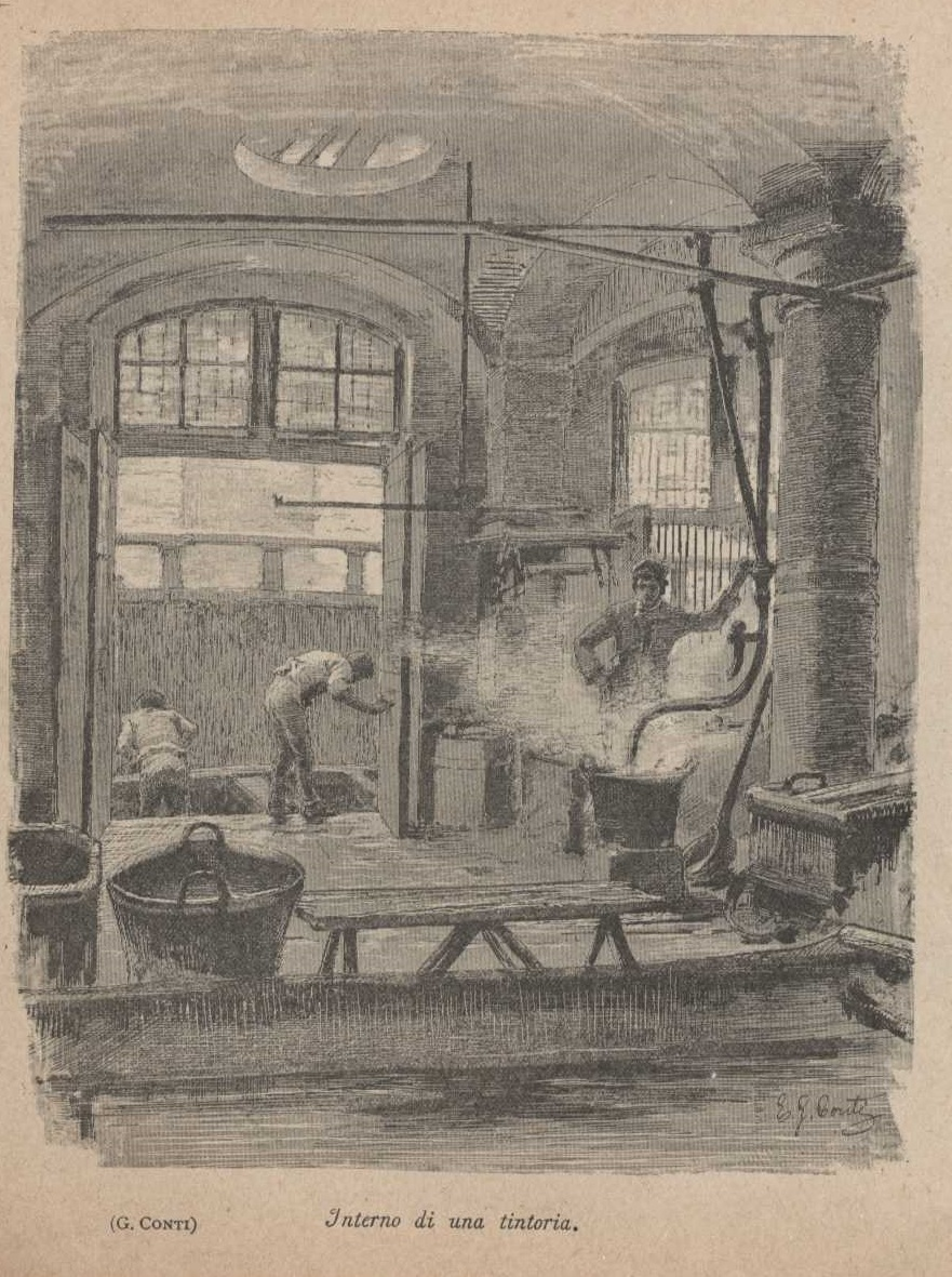 Interno di una tintoria tratto da l naviglio : strenna del Pio Istituto dei Rachitici di Milano